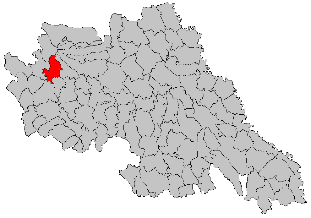 Categorie:Hărţi ale judeţului Iaşi